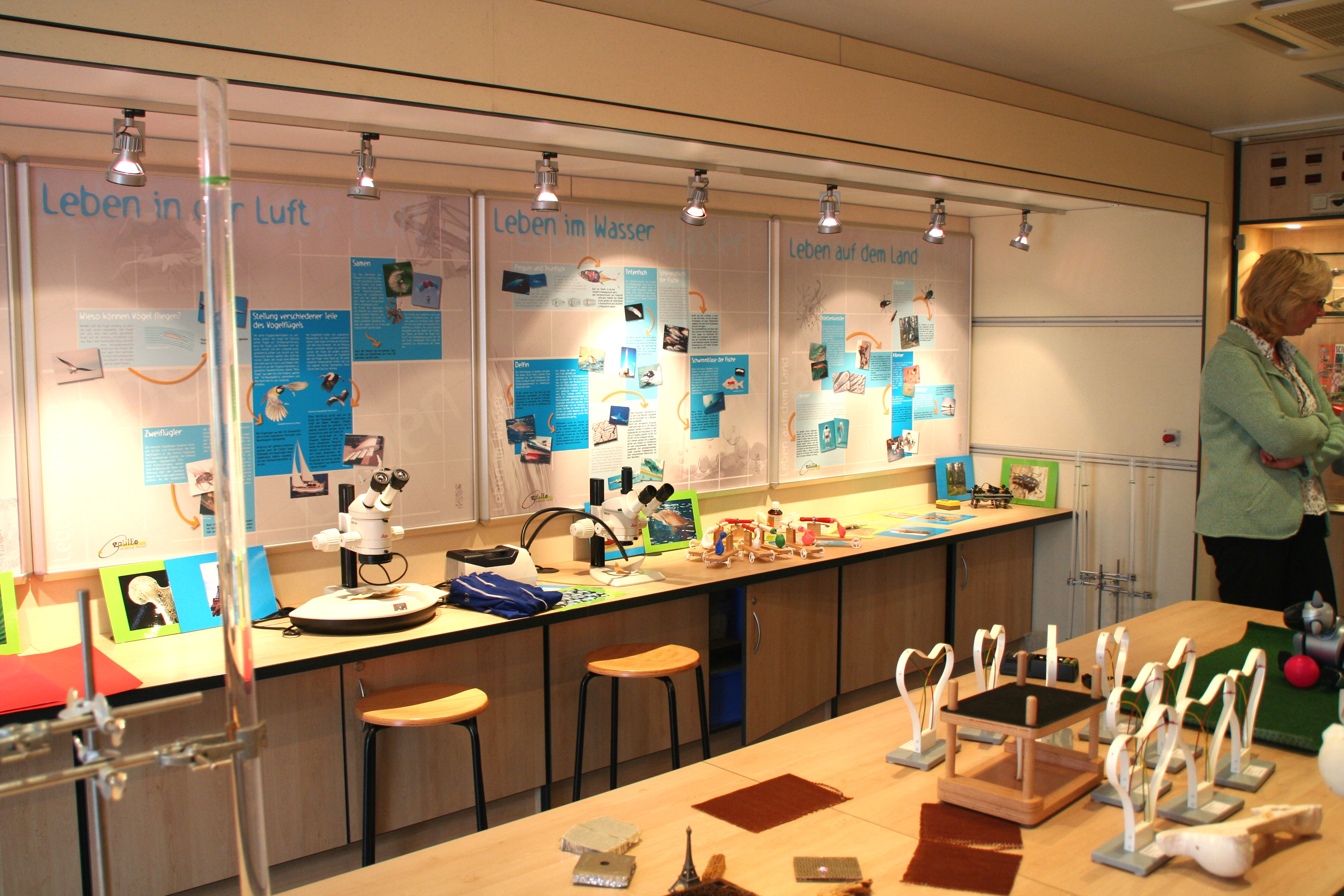 De Galileo Science Mobil bannen.